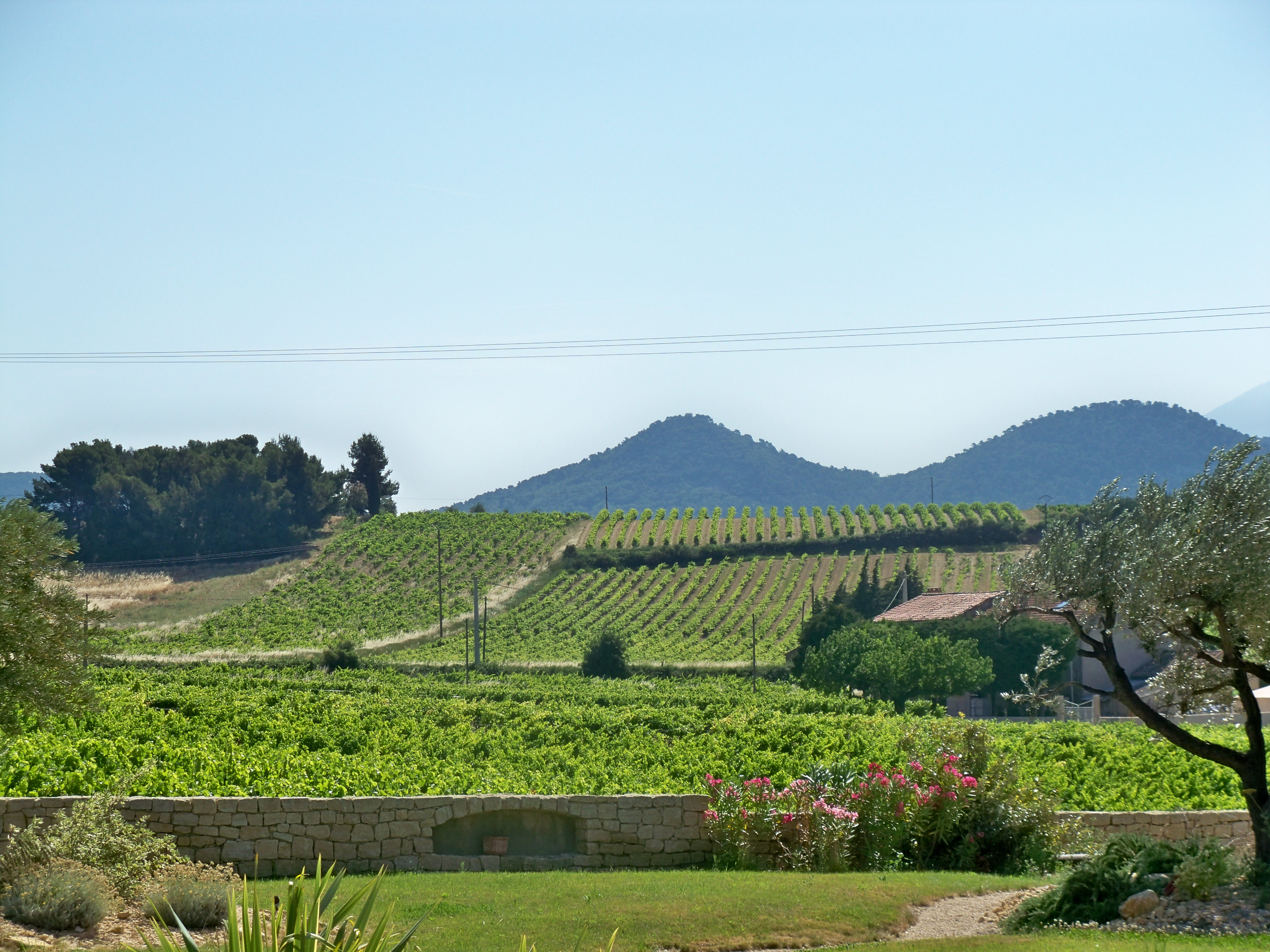 Vignoble de Rasteau, Vaucluse